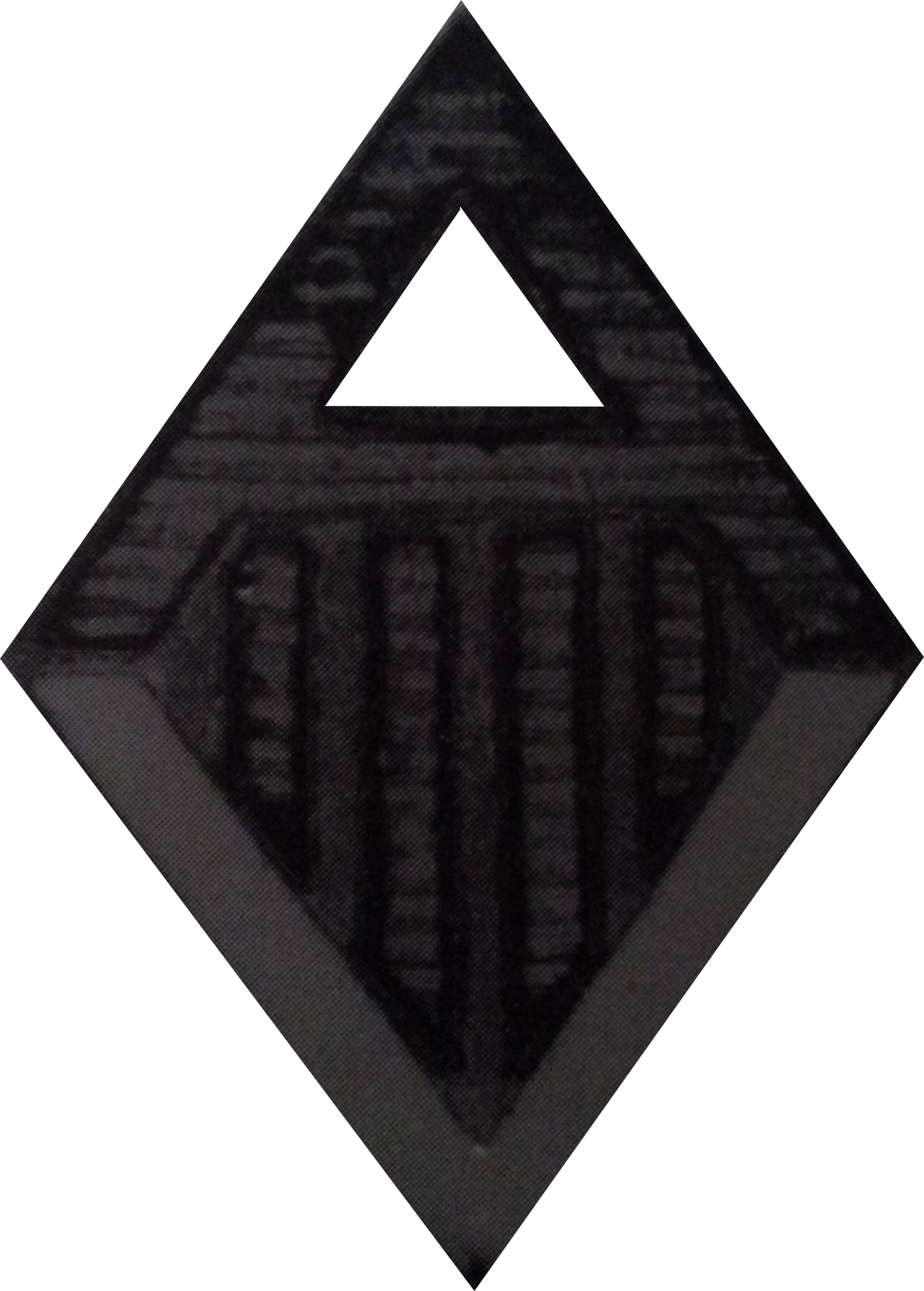 Logotip d'Acció Valenciana, 1936-1936.